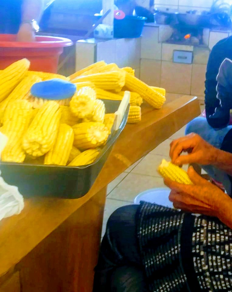 Pessoas preparando mingau de milho verde na área rural do município de Imbaú, no Paraná.